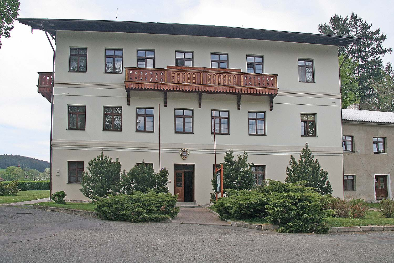 Dalečín - zámek, district Žďár nad Sázavou